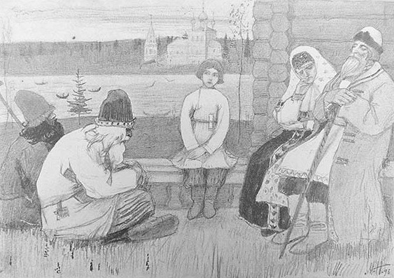 Иллюстрация к книге В. М. Михеева "Отрок мученик. Углицкое предание.", рассказывающей о ребёнке-мученике Иоанне Чеполосове.